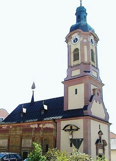 Die Lorettokapelle in Thyrnau